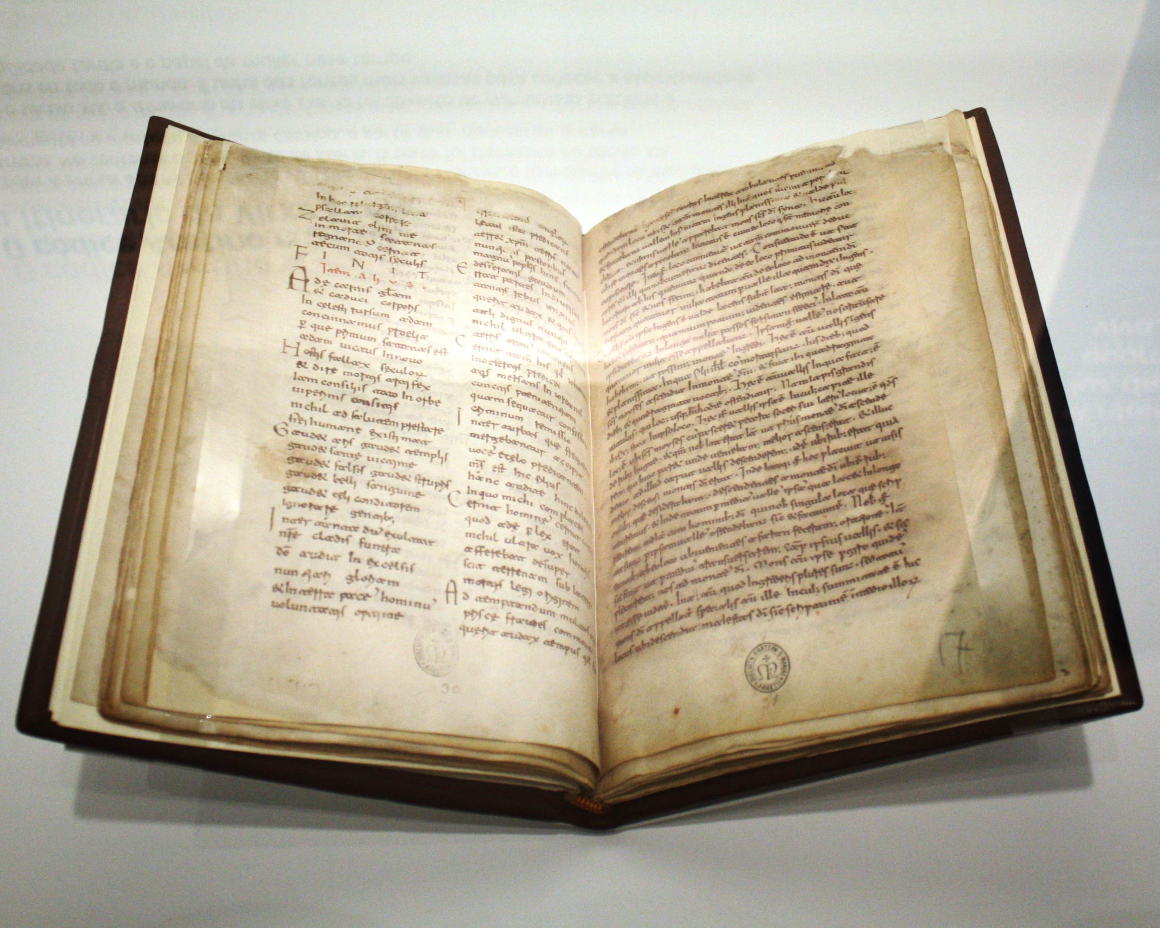 Manuscrito da Viaxe de Exeria (século XI), conservado na Biblioteca Comunale de Arezzo (Italia)